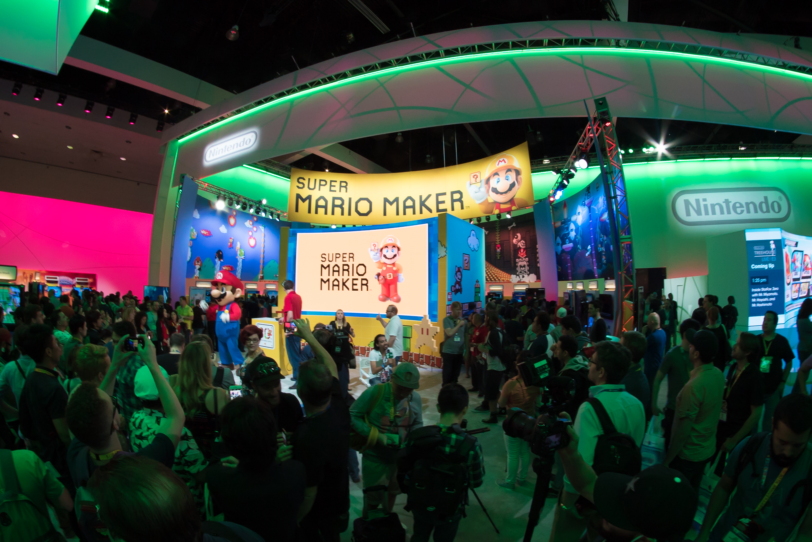 Photographie de Dalvenjah FoxFire : Photographie de Nintendo présentant un stand pour Super Mario Maker à l'E3 2015